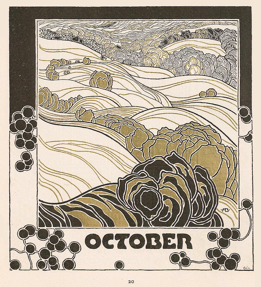 Herbstglut - Kalender 1901